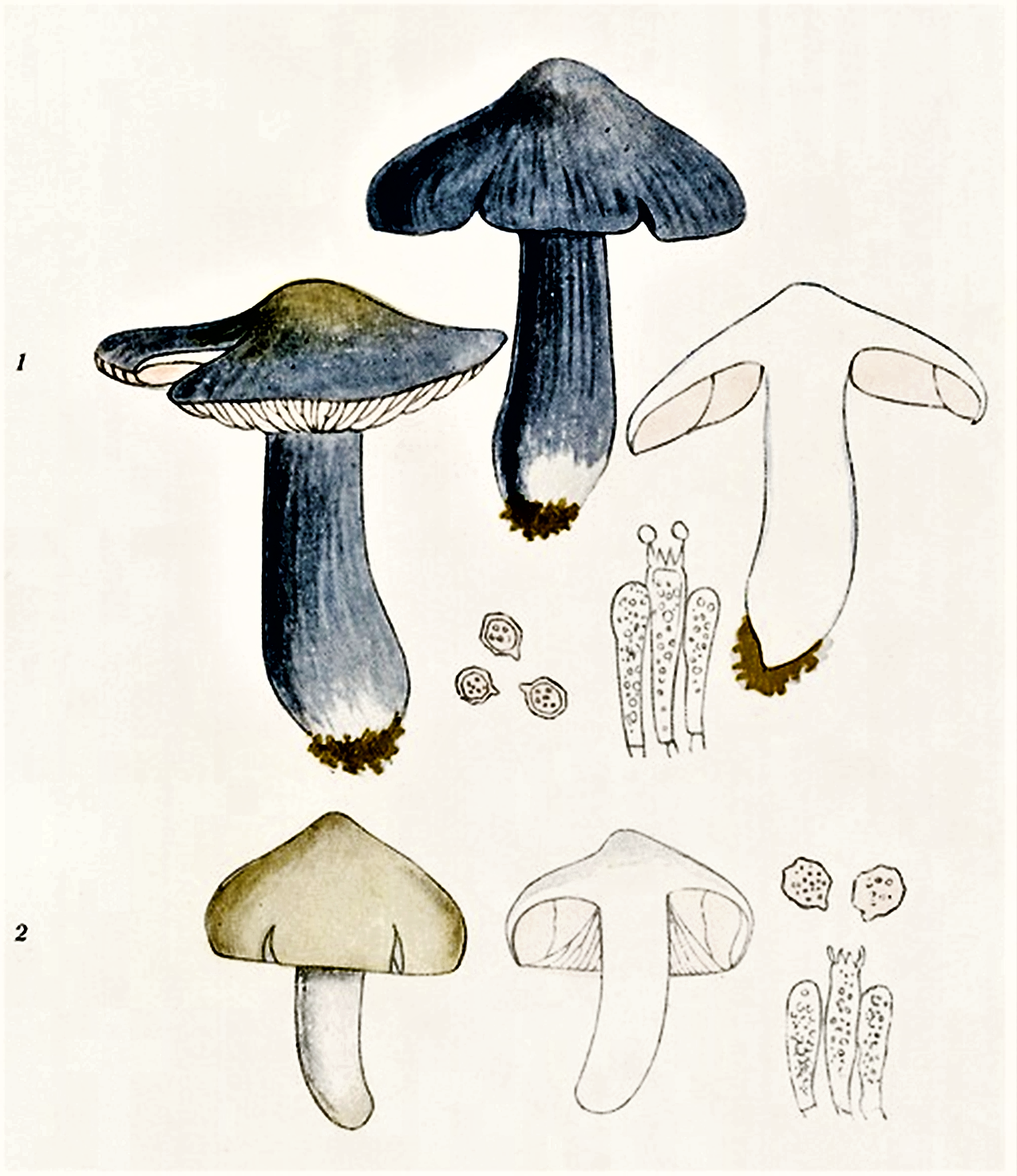 Giacomo Bresadola: 1. Entoloma bloxamii (Berk. & Broome, 1854) Sacc. (1887) 2. Entoloma prunuloides (Fr., 1821) Quél. (1872)